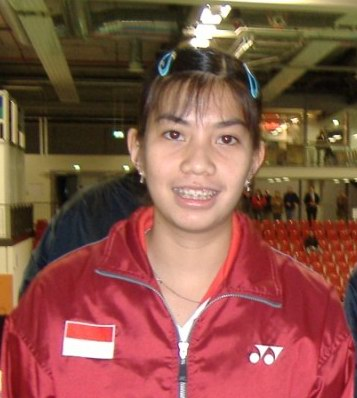 foto karya sendiri saat German Open 2006 di Muelheim, Jerman.